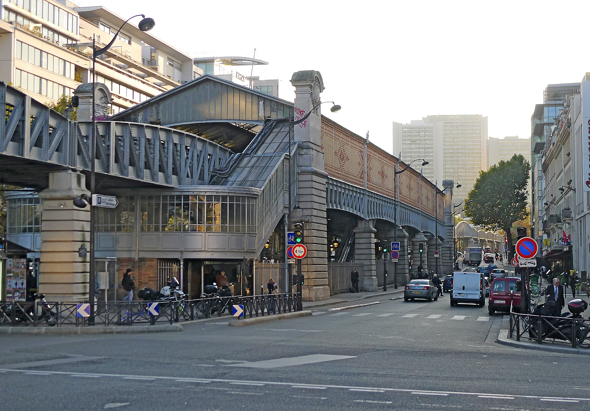 Boulevard Vincent-Auriol, station de métro "quai de la gare" - Paris XIII